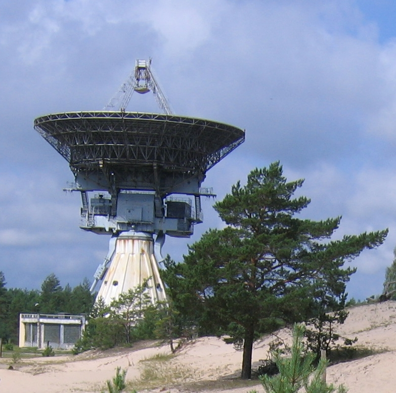 Irbene